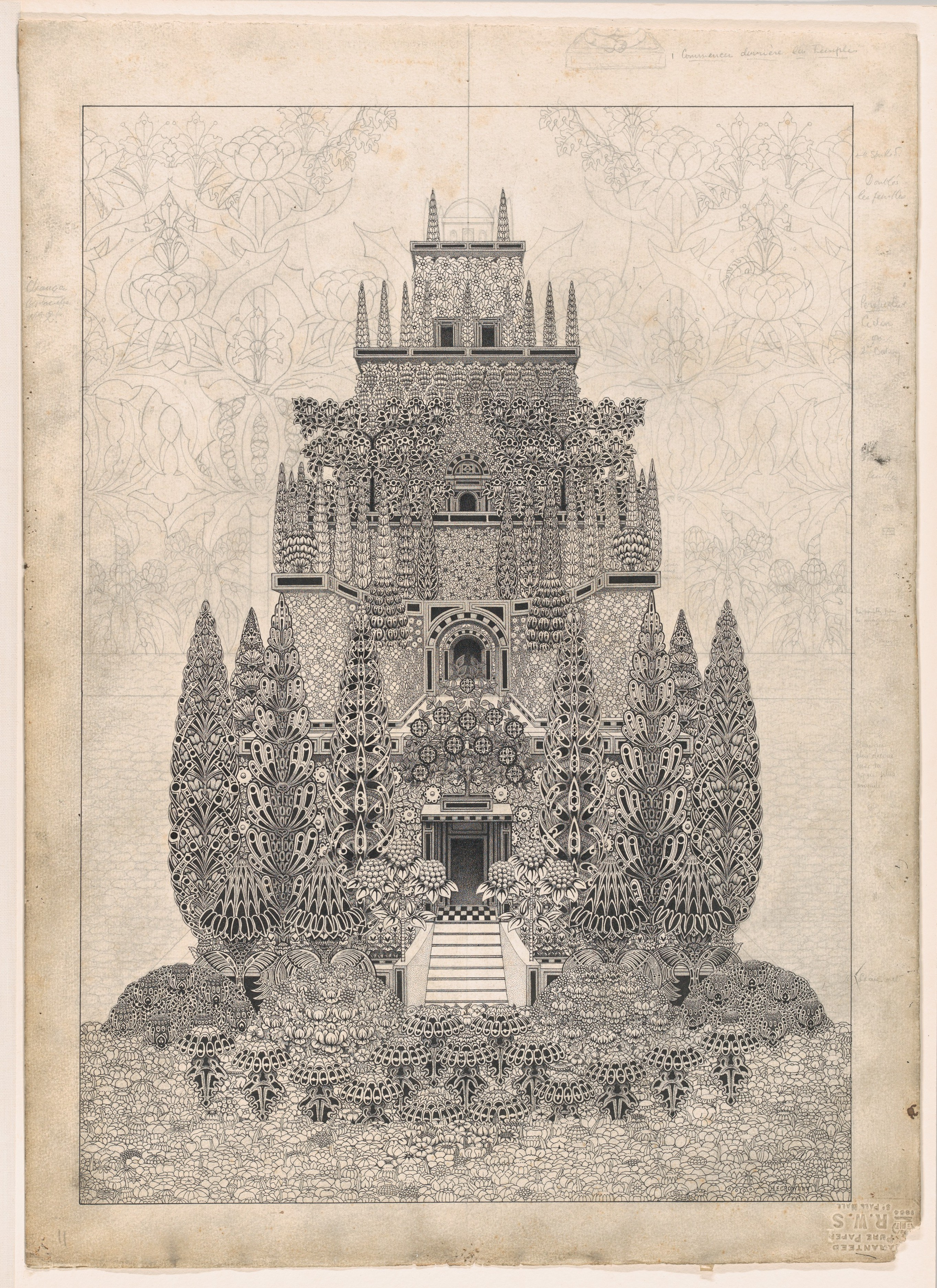 Drawing; Drawings